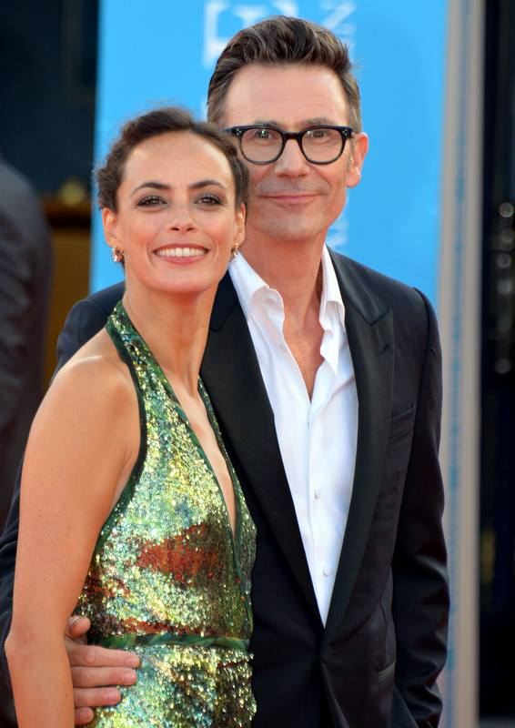 Bérénice Bejo et Michel Hazanavicius au festival du cinéma américain de Deauville